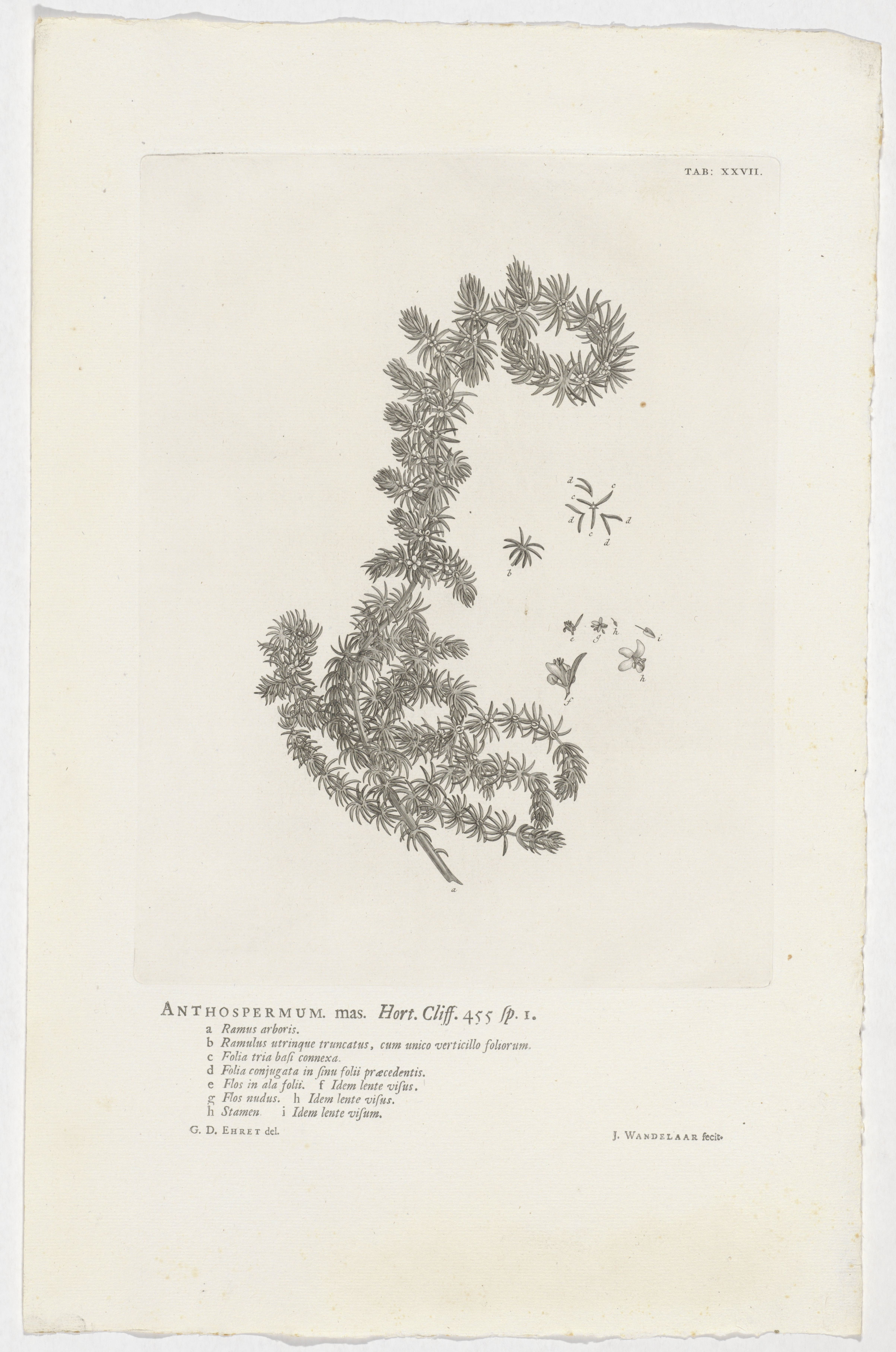 IdentificatieTitel(s): Anthospermum aethiopicumAnthospermum mas. Hort. Cliff. 455 sp. 1 (titel op object)Objecttype: prent boekillustratie Objectnummer: RP-P-OB-61.478Catalogusreferentie: Wurzbach 7Omschrijving: Rechtsboven gemerkt: TAB: XXVII.VervaardigingVervaardiger: prentmaker: Jan Wandelaar (vermeld op object)naar tekening van: Georg Dionys Ehret (vermeld op object)Plaats vervaardiging: WarmondDatering: 1738Fysieke kenmerken: ets en boekdrukMateriaal: papier Techniek: etsen / boekdrukAfmetingen: plaatrand: h 290 mm × b 222 mmToelichtingPrent gebruikt als illustratie in: Linnaeus, Carolus. Hortus Cliffortianus plantas exhibens quas in hortis tam vivis quam siccis, Hartecampi in Hollandia, coluit (...) Georgius Clifford. Amsterdam: sine nomen, 1738.OnderwerpWat: plants and herbsflowersVerwerving en rechtenVerwerving: onbekendCopyright: Publiek domein